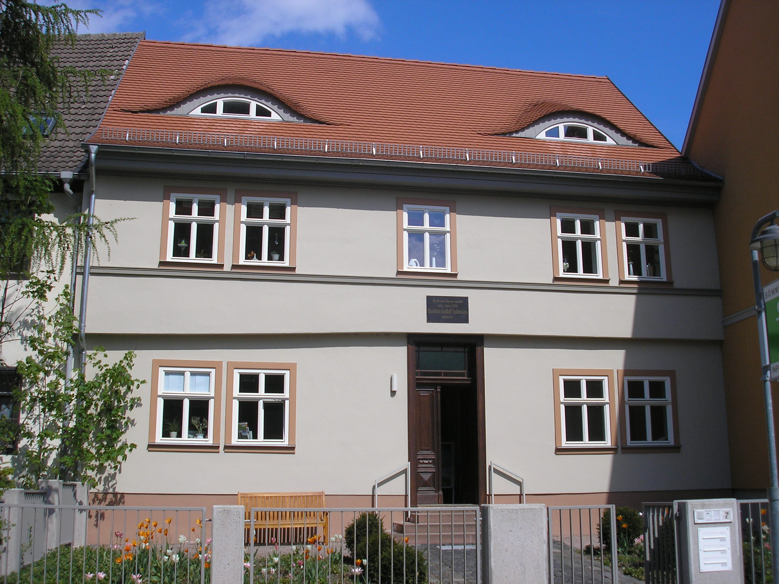 Das Geburtshaus von Salzmann in Sömmerda (Thüringen).